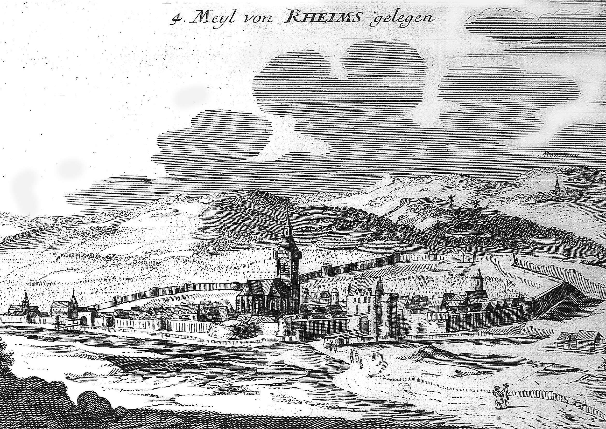 vue de Ay dessin et Montigny.